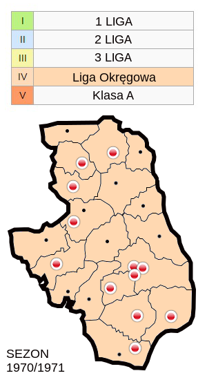 Jagiellonia w sezonie 1970/71- mapa klubów